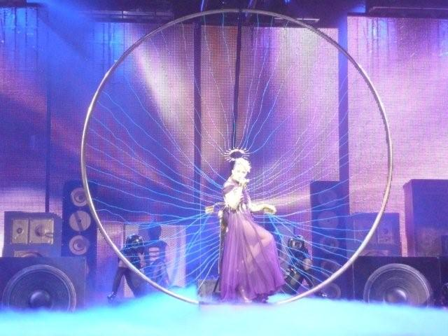 KylieX2008